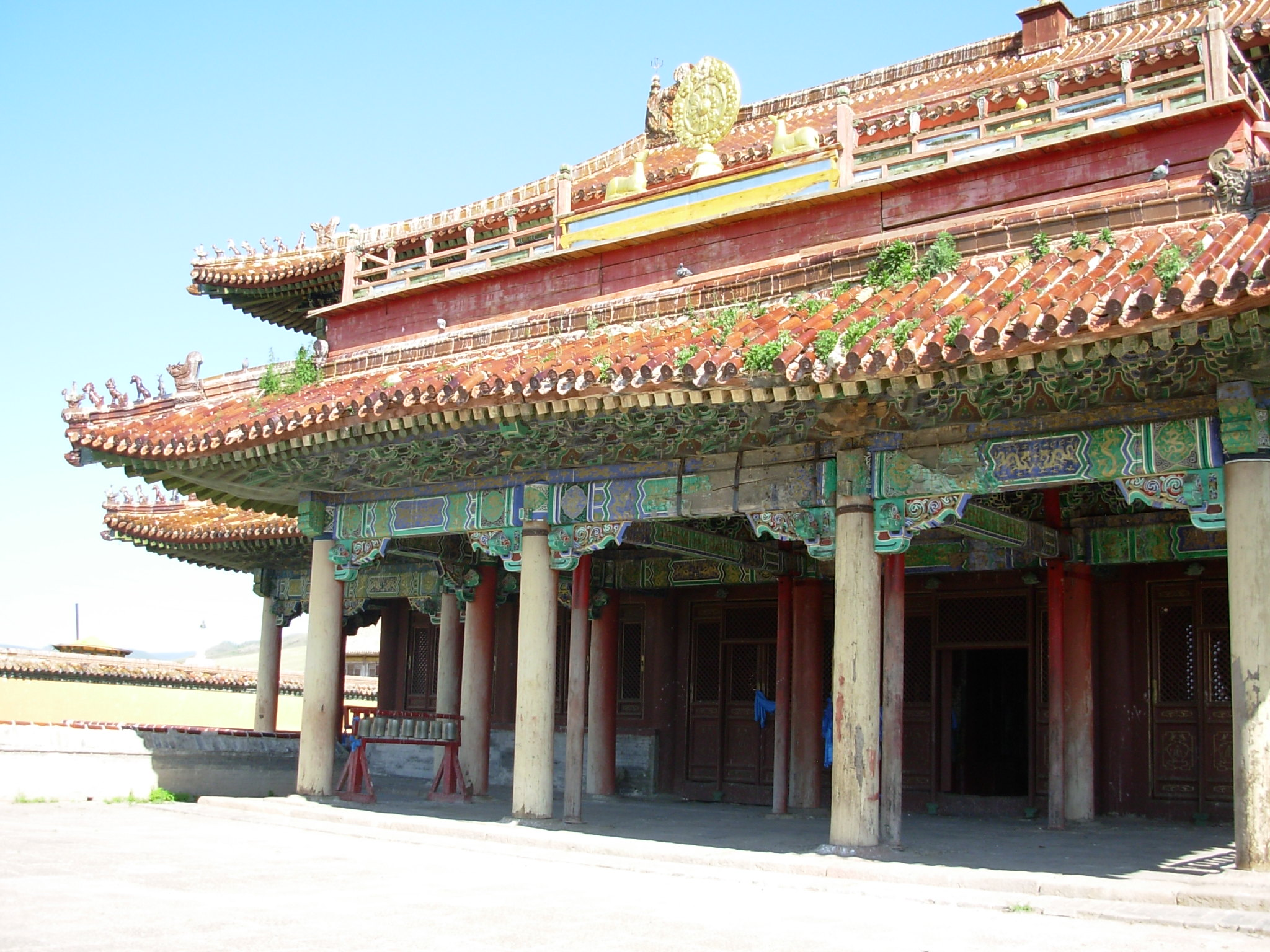 Amarbayasgalant Khiid